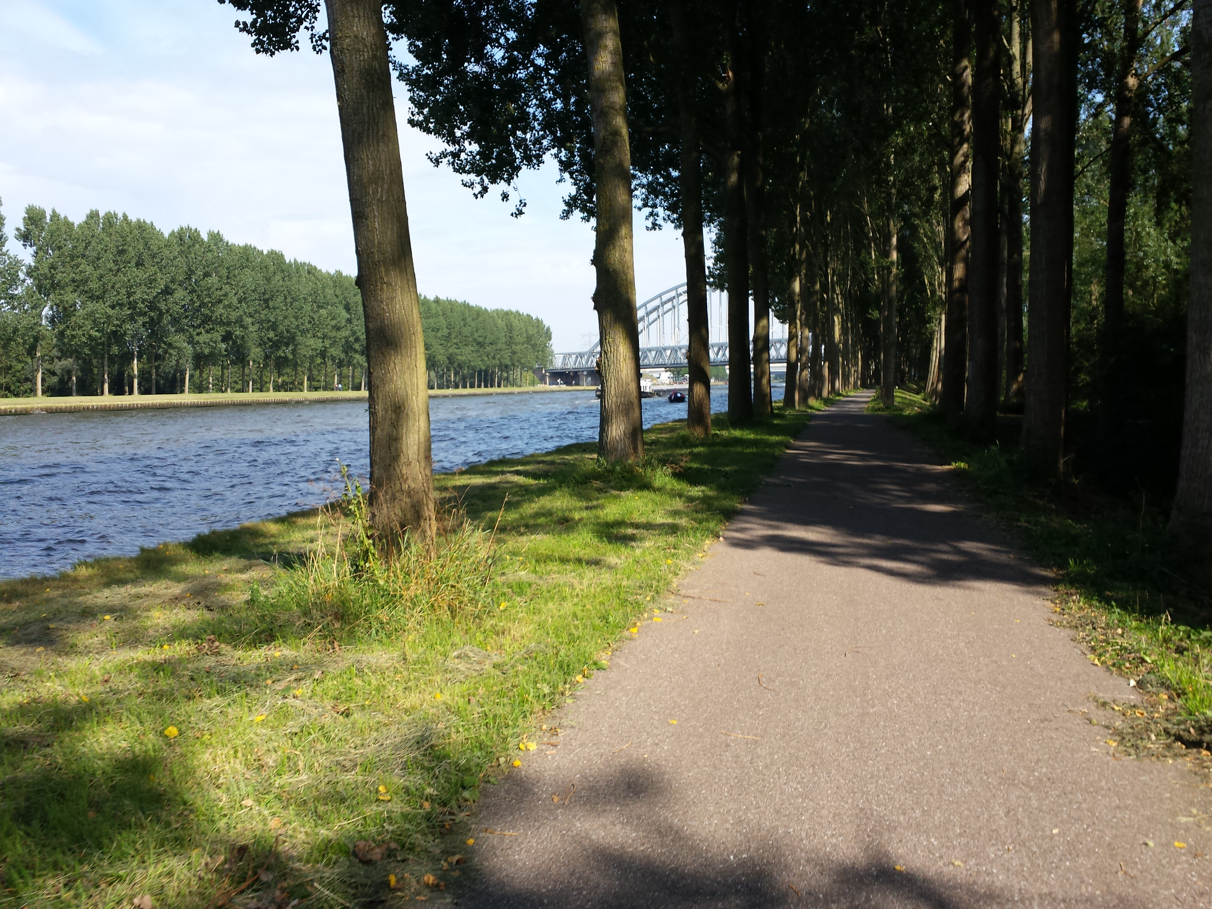 Weesp, Netherlands